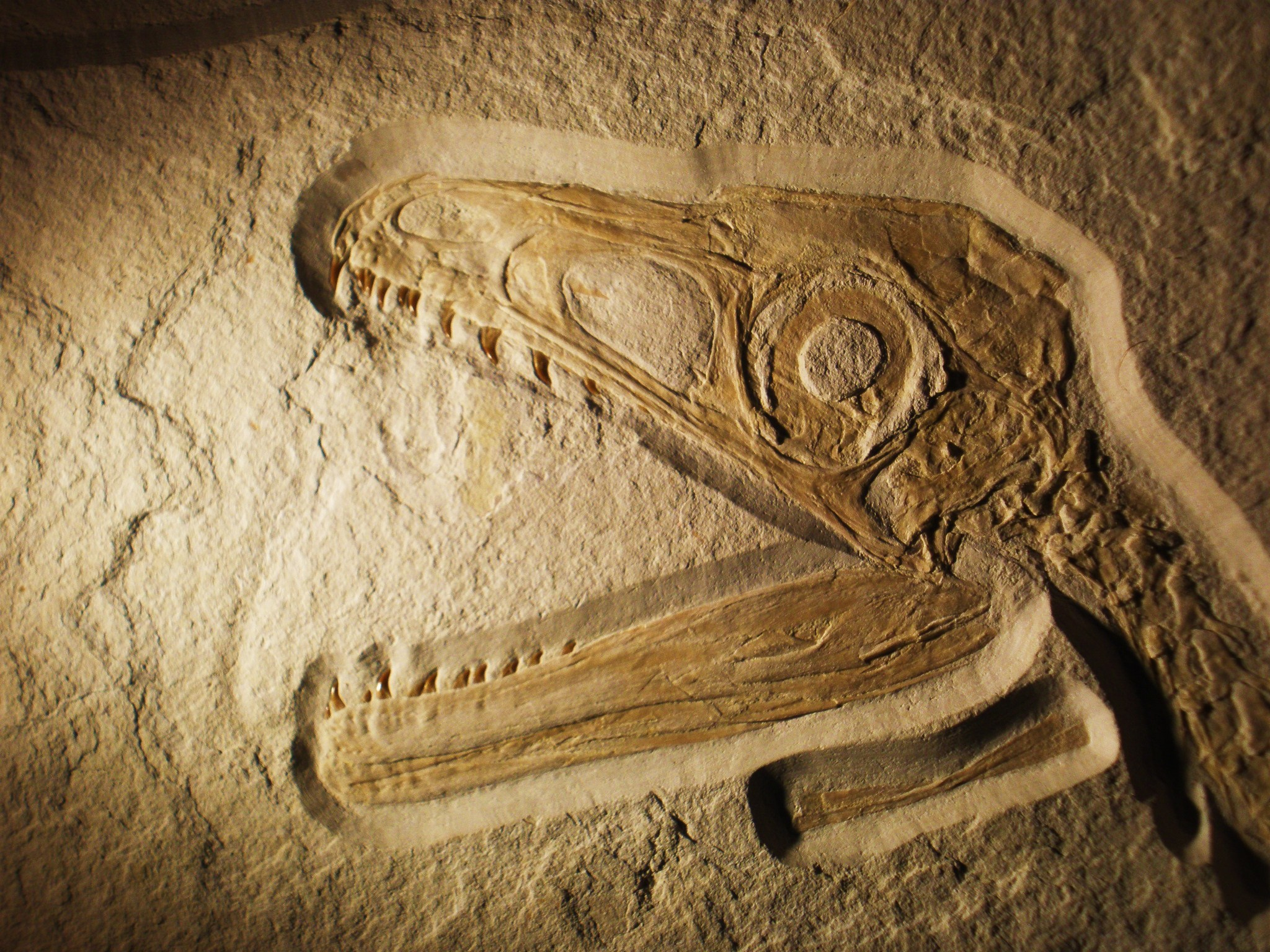 Fossil of Sciurumimus, an extinct theropod- Took the photo at Fossil Show, Munich